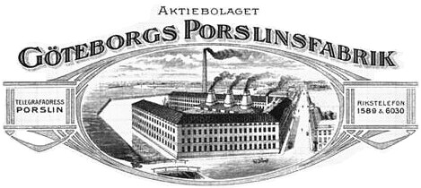 Fabrikslogga Göteborgs porslinsfabrik. Publicerad före 1941 (då företaget lades ner).